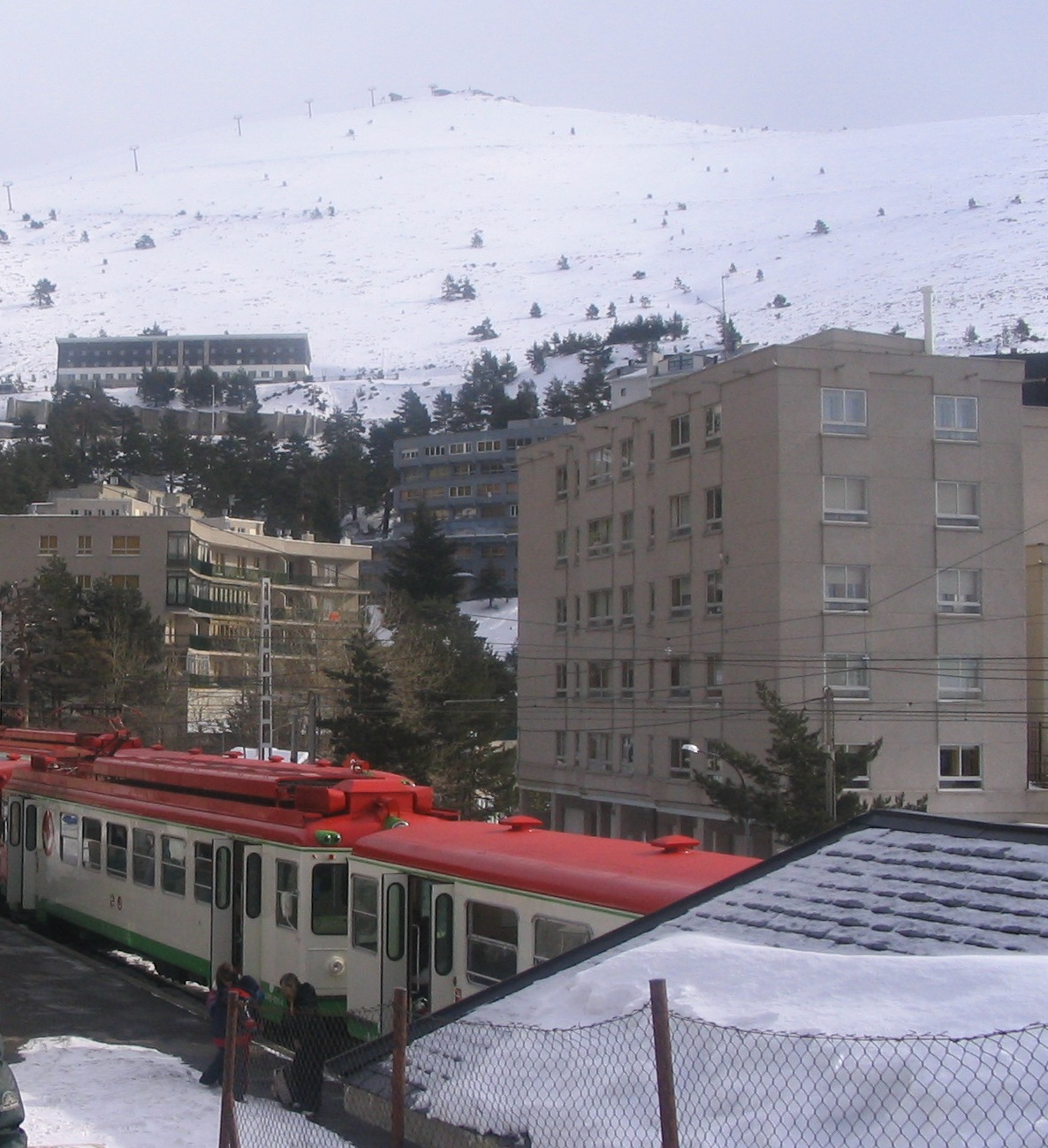 Estación de tren del Puerto de Navacerrada (Comunidad de Madrid, España).